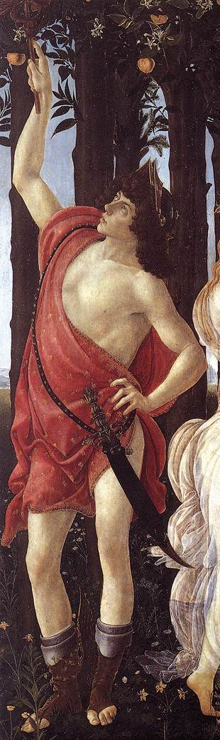 Mercurio. Particolare da "La Primavera" di Sandro Botticelli